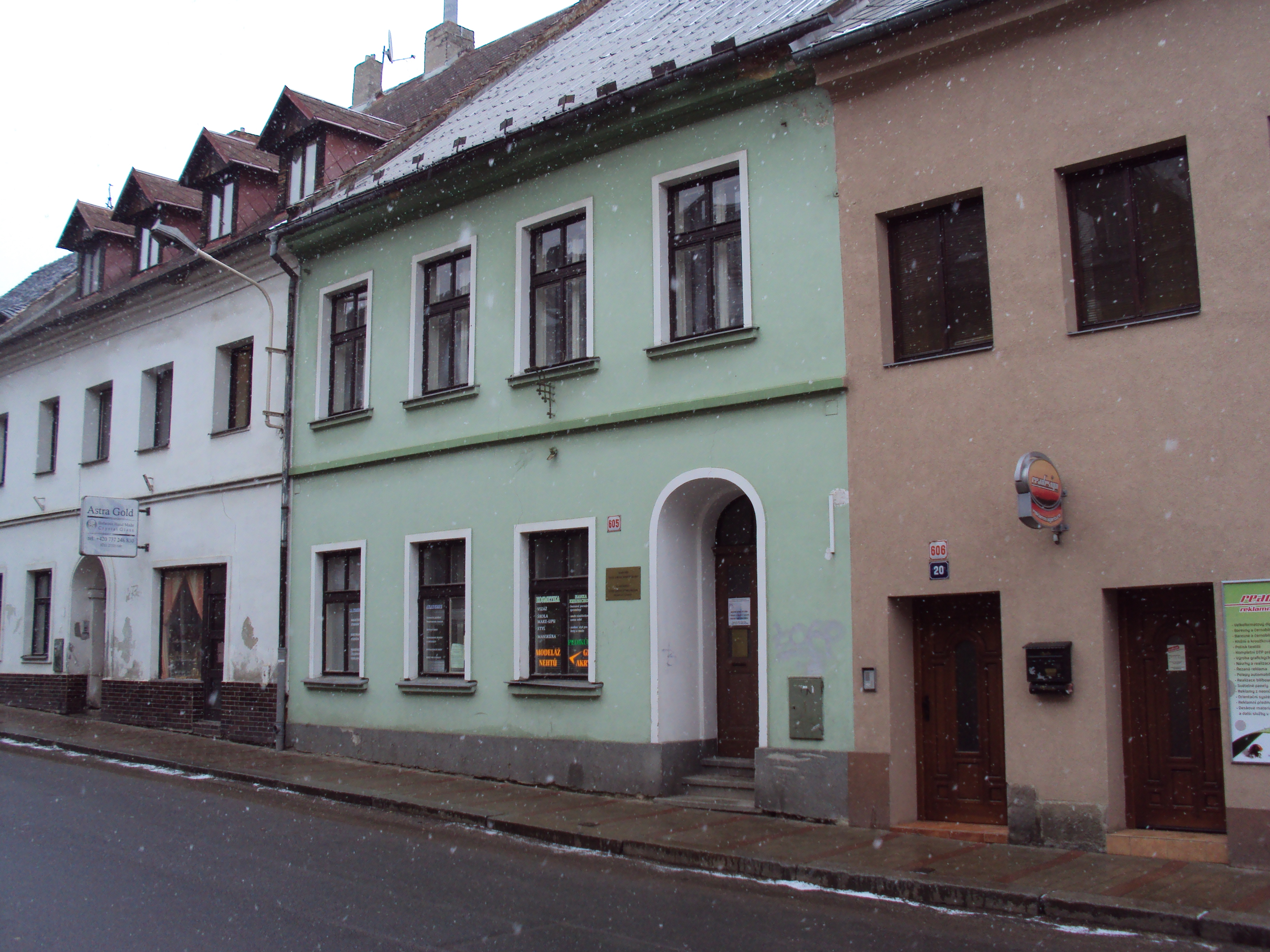 Česky: Sídlo Akademie Komenského v Mariánské ulici